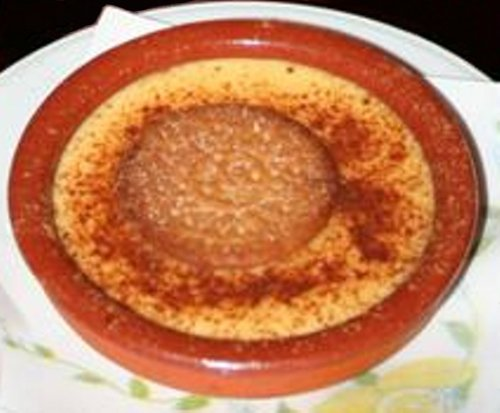 Unas natillas.